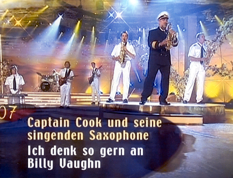 Auftritt Reinhardt Reissner im ZDF als Captain Cook, Rechtliche Freigabe durch Reinhardt Reissner an Wikipedia geschickt